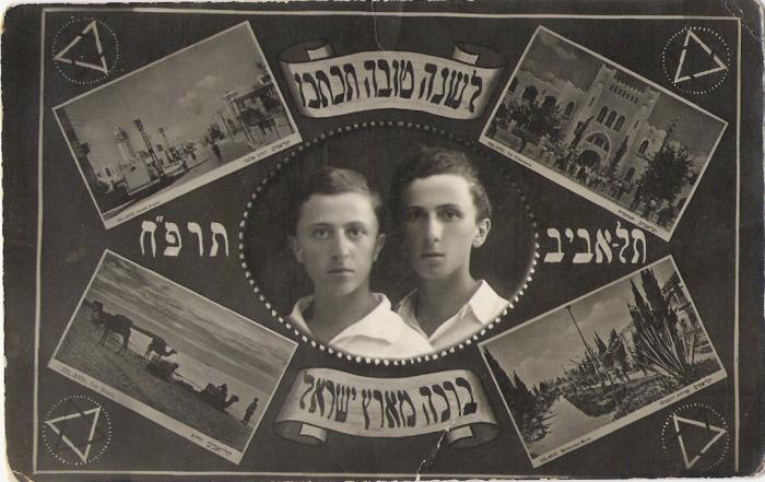 שנה טובה ברוח התקופה: 1927